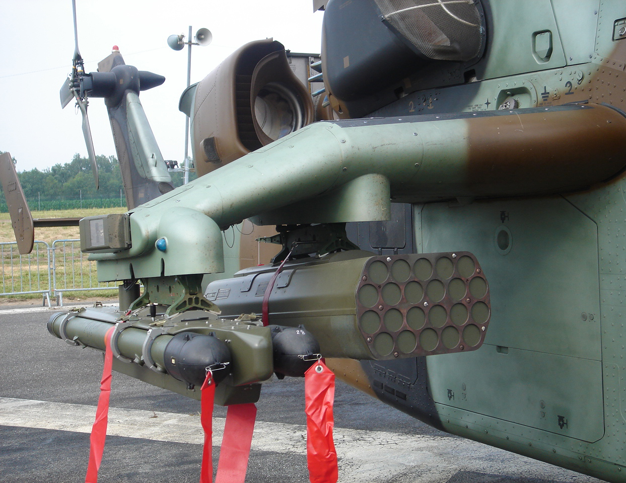 Parte del armamento de un helicóptero Eurocopter Tigre HAP del Armée de Terre francés: 2 misiles aire-aire Mistral Pod de cohetes no guiados (alcance 4000 m)